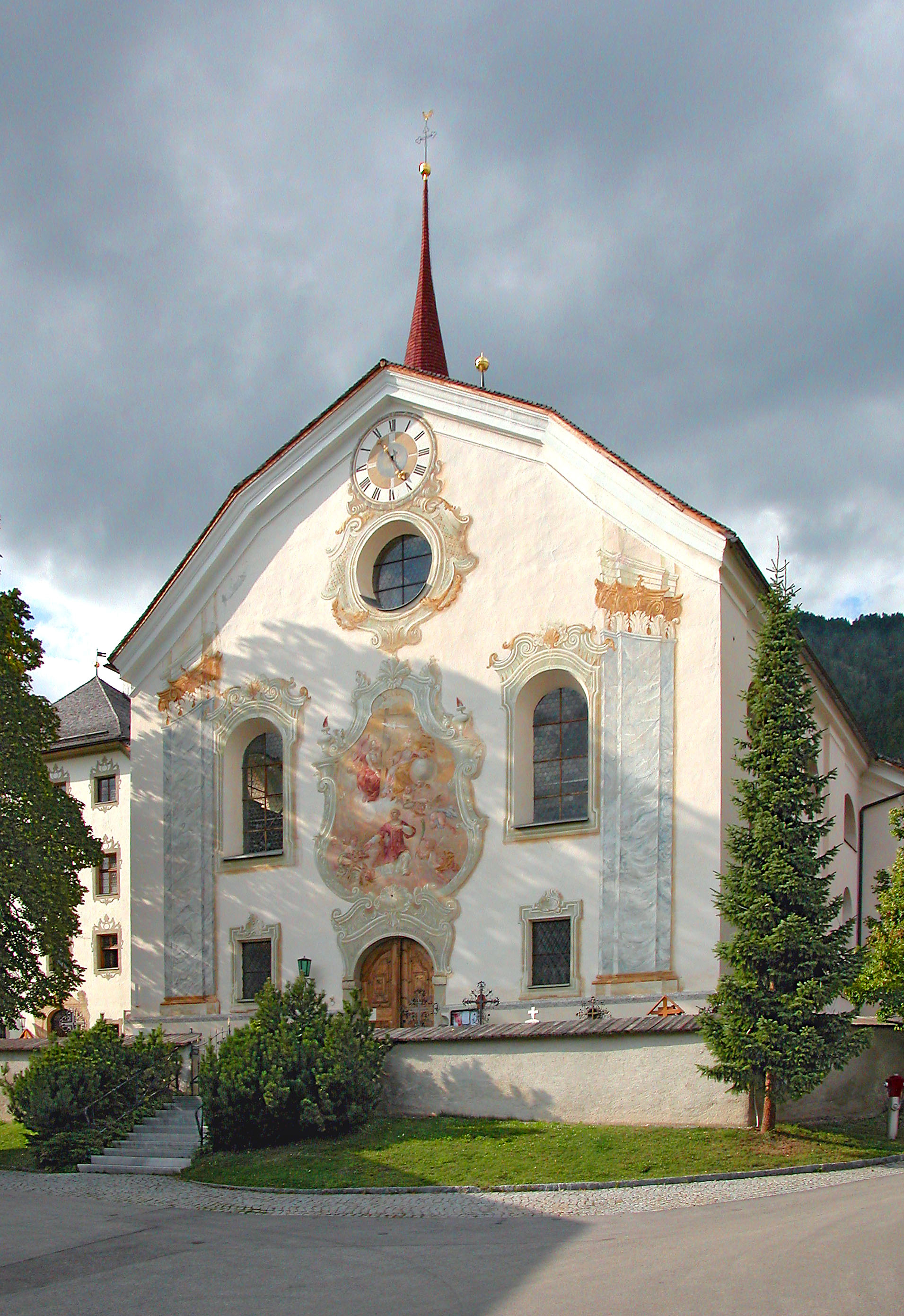 25.08.2005 A 9912 Anras in Tirol/Österreich: Die katholische Kirche St. Stephanus (GMP: 46.772586,12.556321) wurde unter der Leitung von Franz de Paula Penz 1753-55 in barockem Baustil errichtet. Teile der Innenausstattung der vorherigen alten Pfarrkirche, wie der gotische St. Michaels Altar oder eine Madonna mit Kind aus der Zeit um 1520, wurden übernommen. Die Wand- und Deckengemälde schuf Martin Knoller 1754. [DSCN7141.JPG]20050825150DR.JPG(c)Blobelt